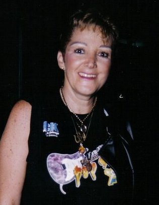 Foto de Diana em Show em Feira de Santana, Bahia